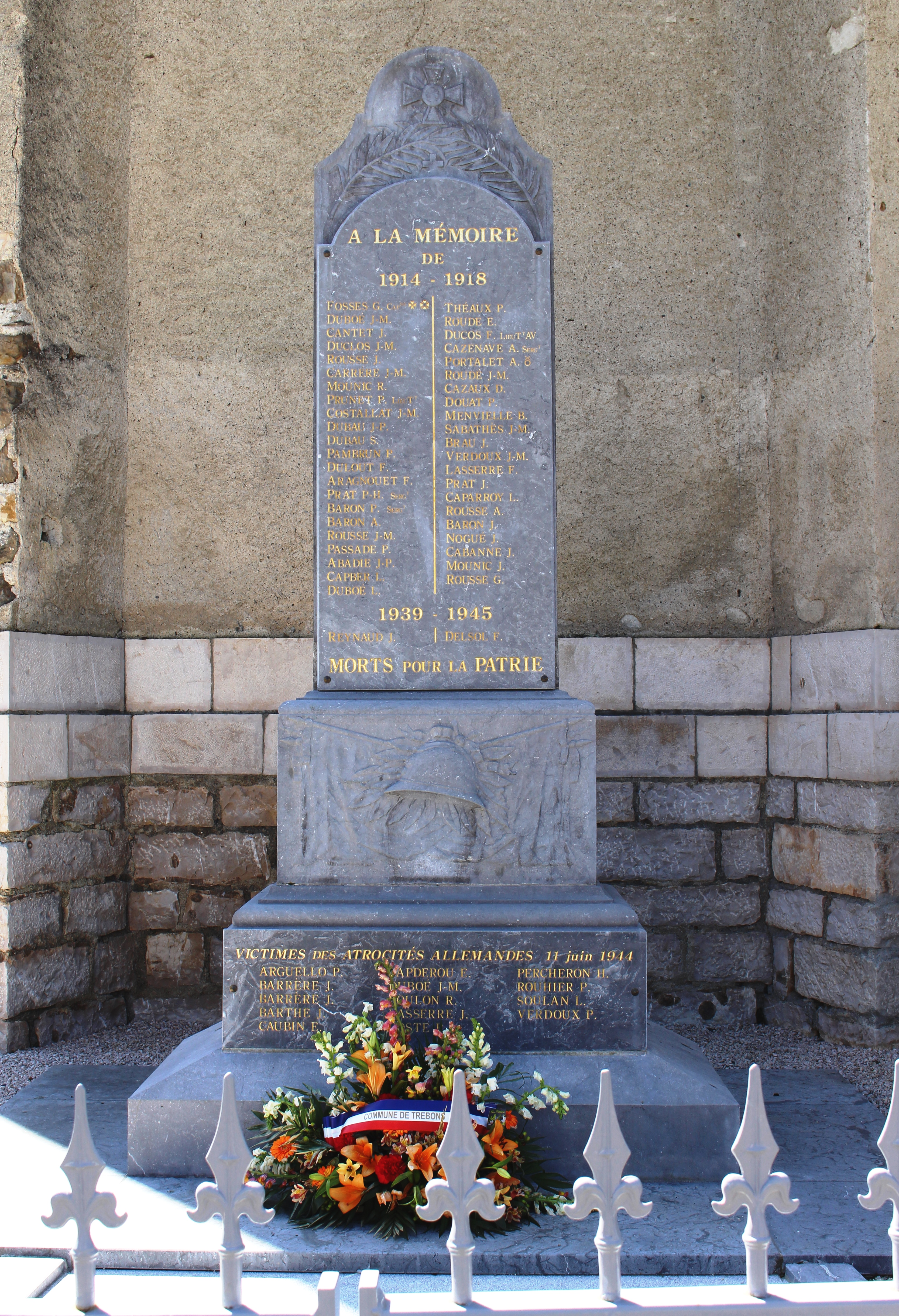 Monument aux morts de Trébons (Hautes-Pyrénées)